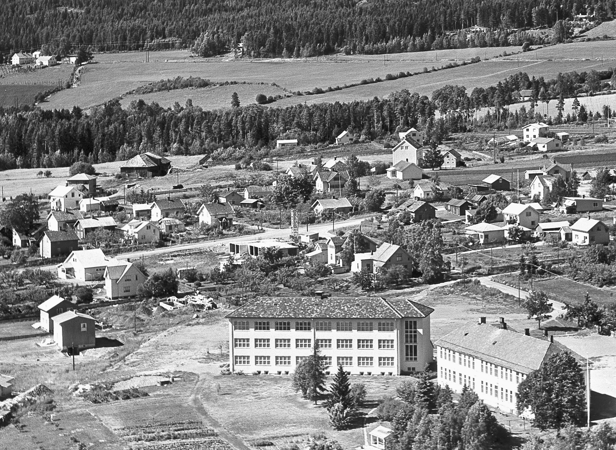 Storhamar skole mot Furuberget i bakgrunnen.